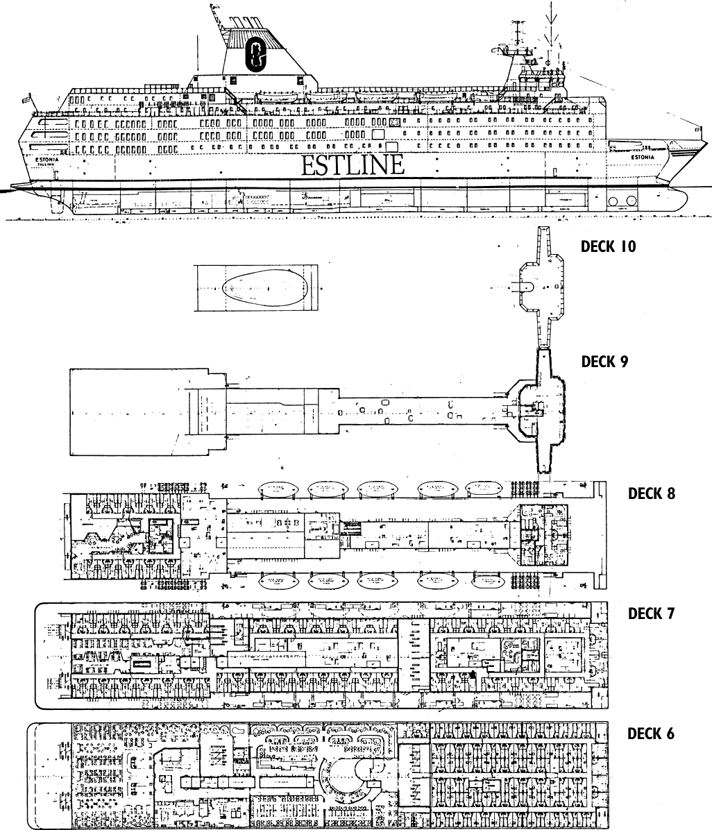 MS Estonia